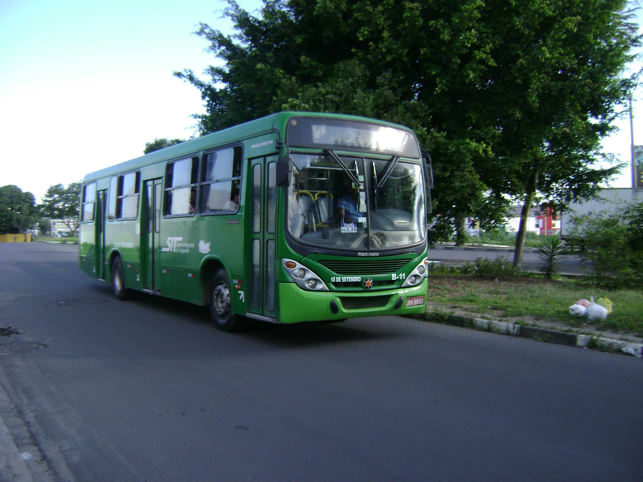 Ônibus na avenida José Falcão da Silva, em Feira de Santana, Bahia, Brasil.